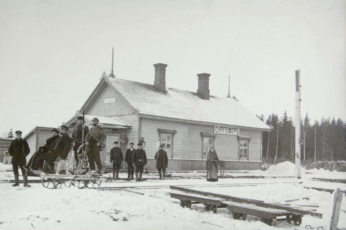 Sürgavere jaam 20.sajandi alguses